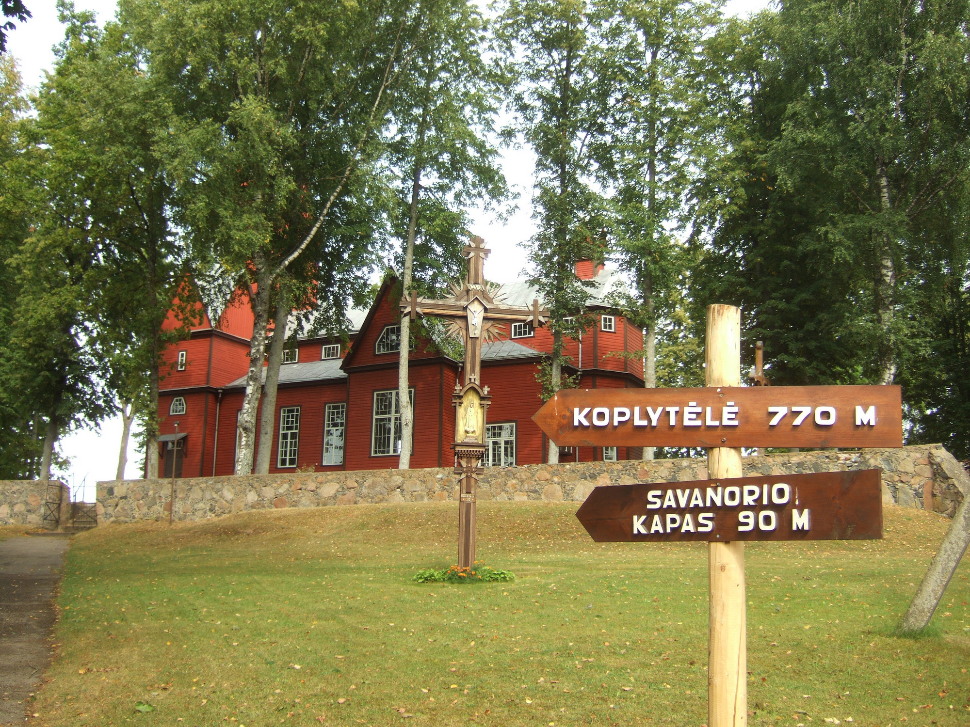 Skudutiškio bažnyčia